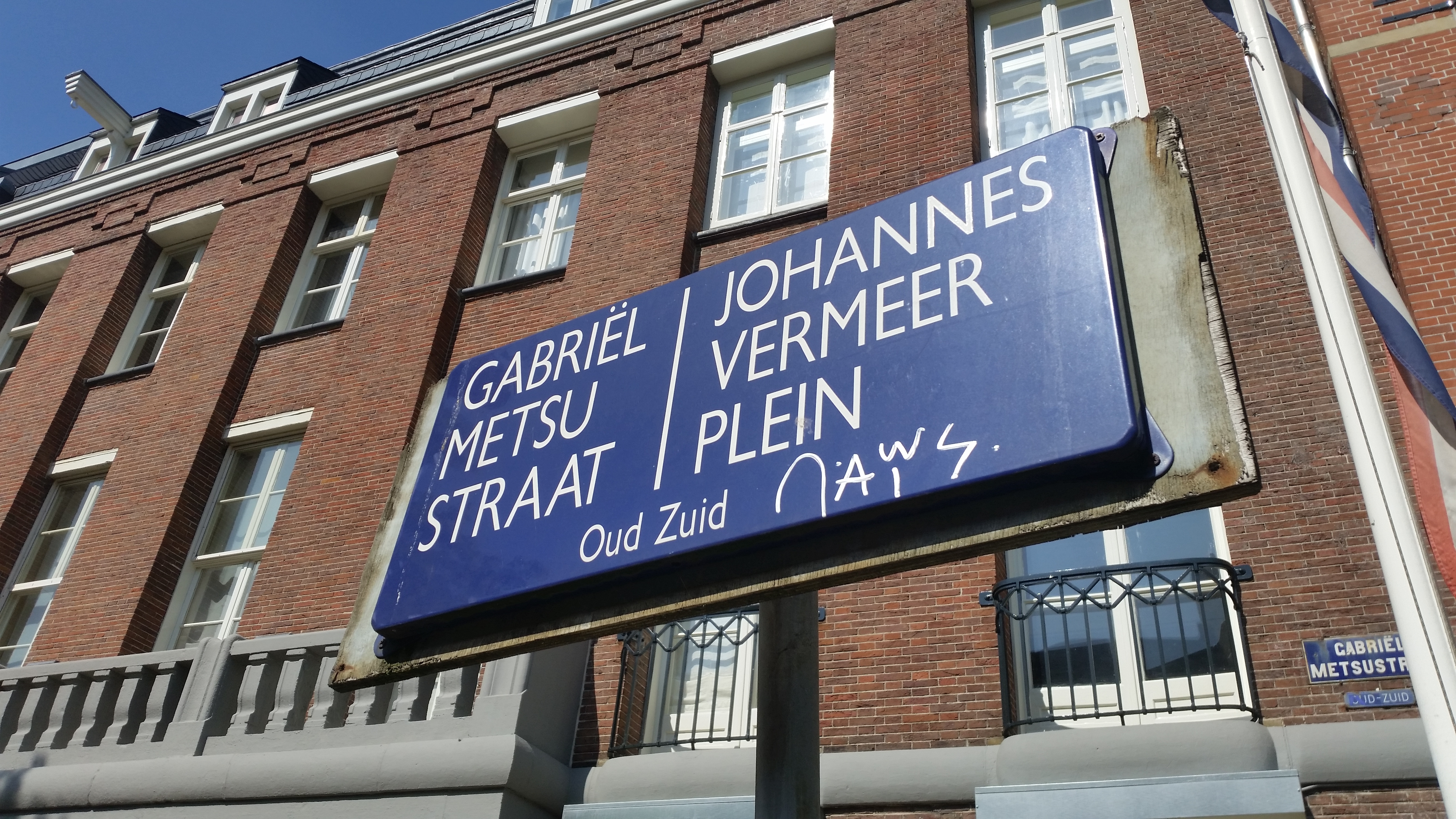 Naambord van Gabriël Metsustraat en het Johannes Vermeerplein, Amsterdam-Zuid; het bord wordt herhaald op de gevels